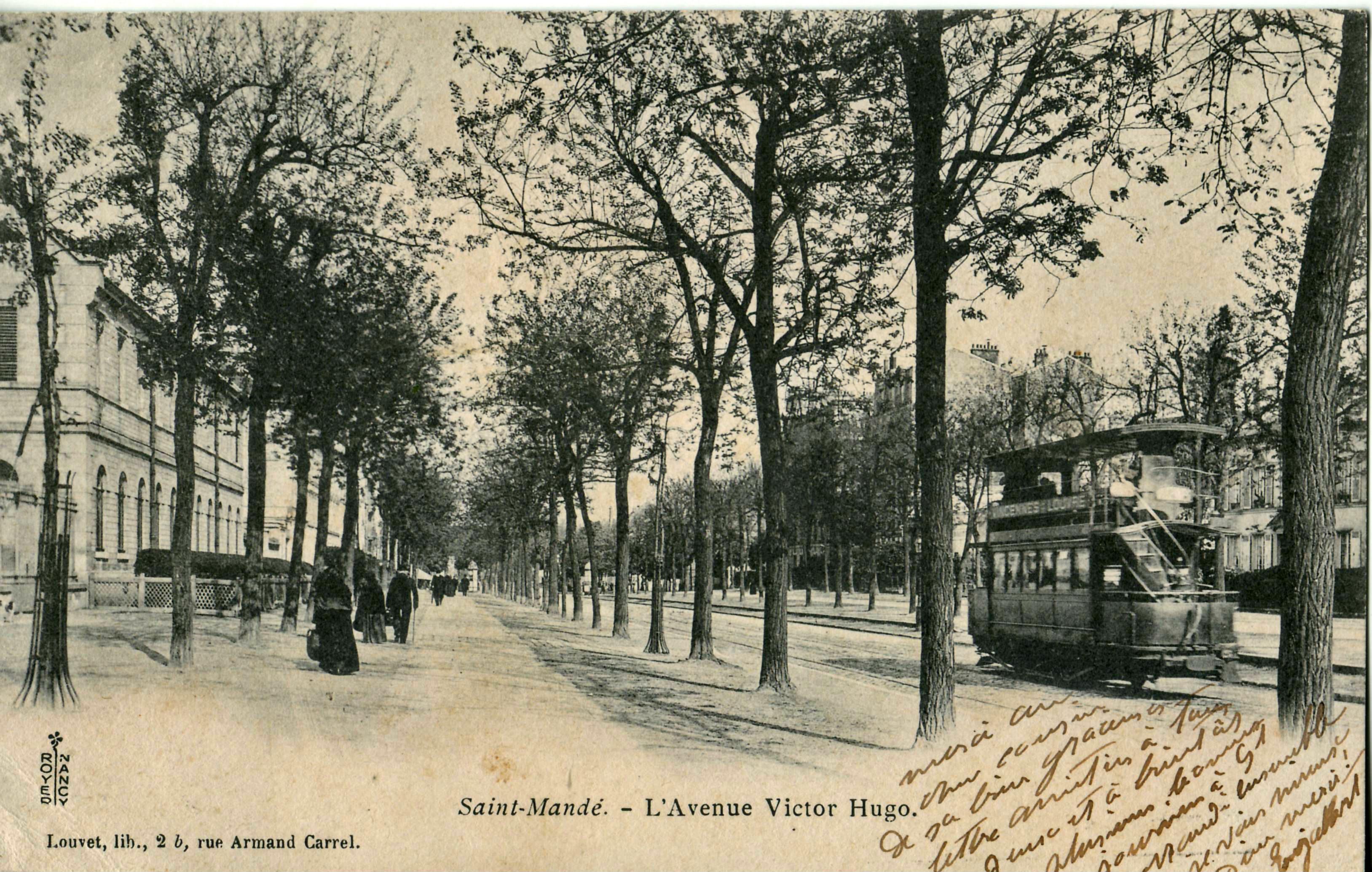 Carte postale ancienne éditée par Royer à Nancy pour Louvet, libraire, 2 b, rue Armand Carel :SAINT-MANDE - L'avenue Victor Hugo